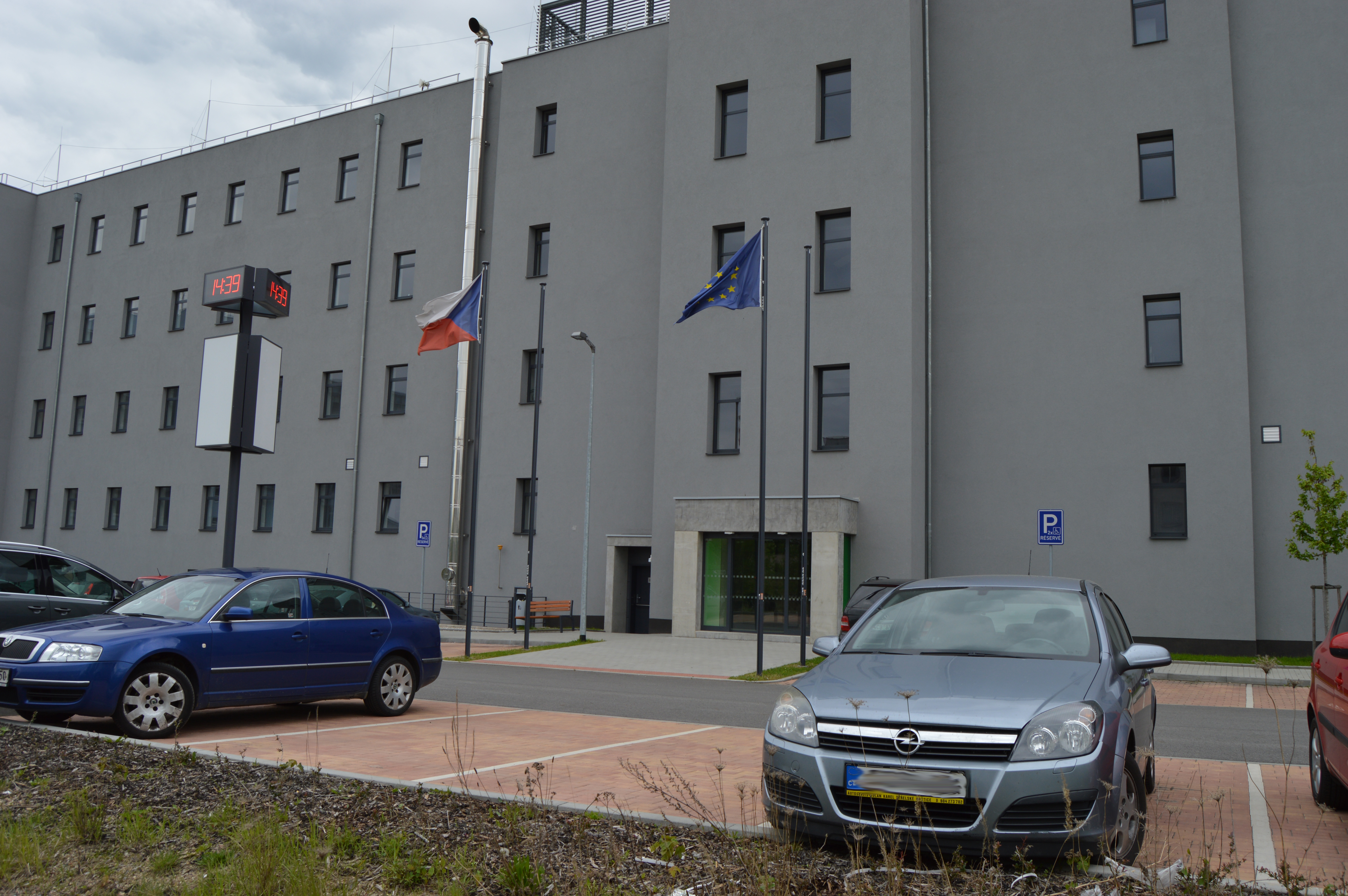 Zadní vchod do budovy TCP